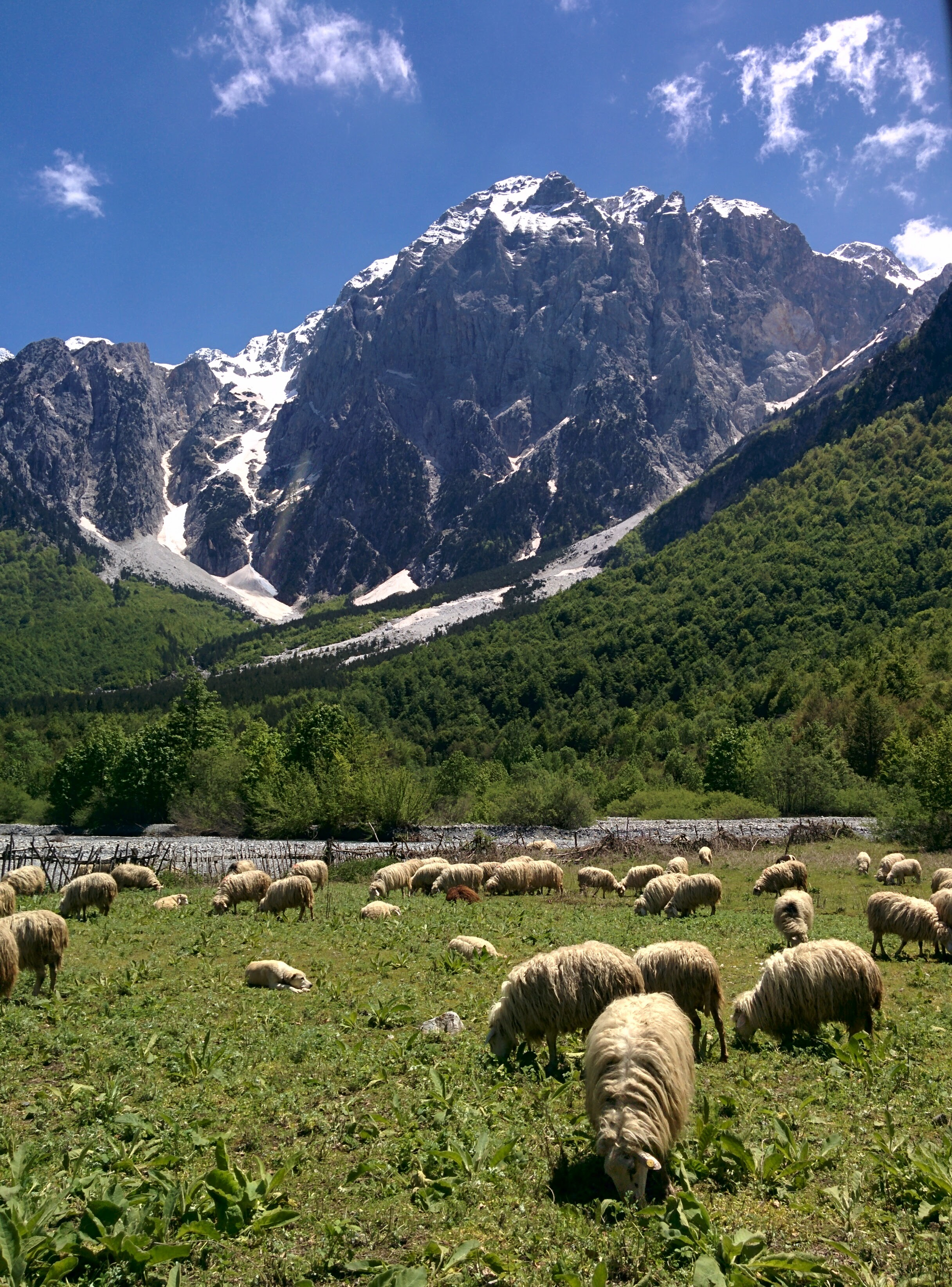 Lugina e Valbones, Tropoje